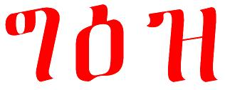 Geez Amh